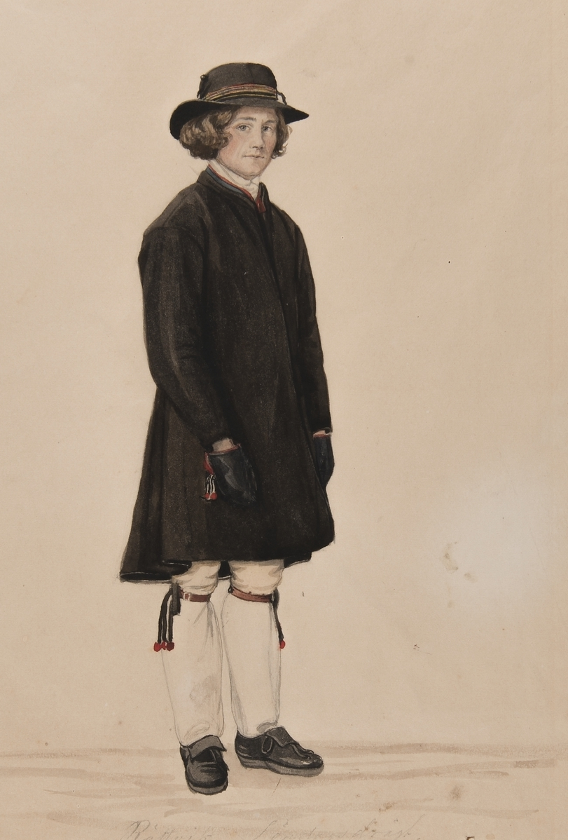 Pojke i Rättviksdräkt, söndagsdräkt. Akvarell av P.Södermark. Depicted place: Mora socken (Q10588912)